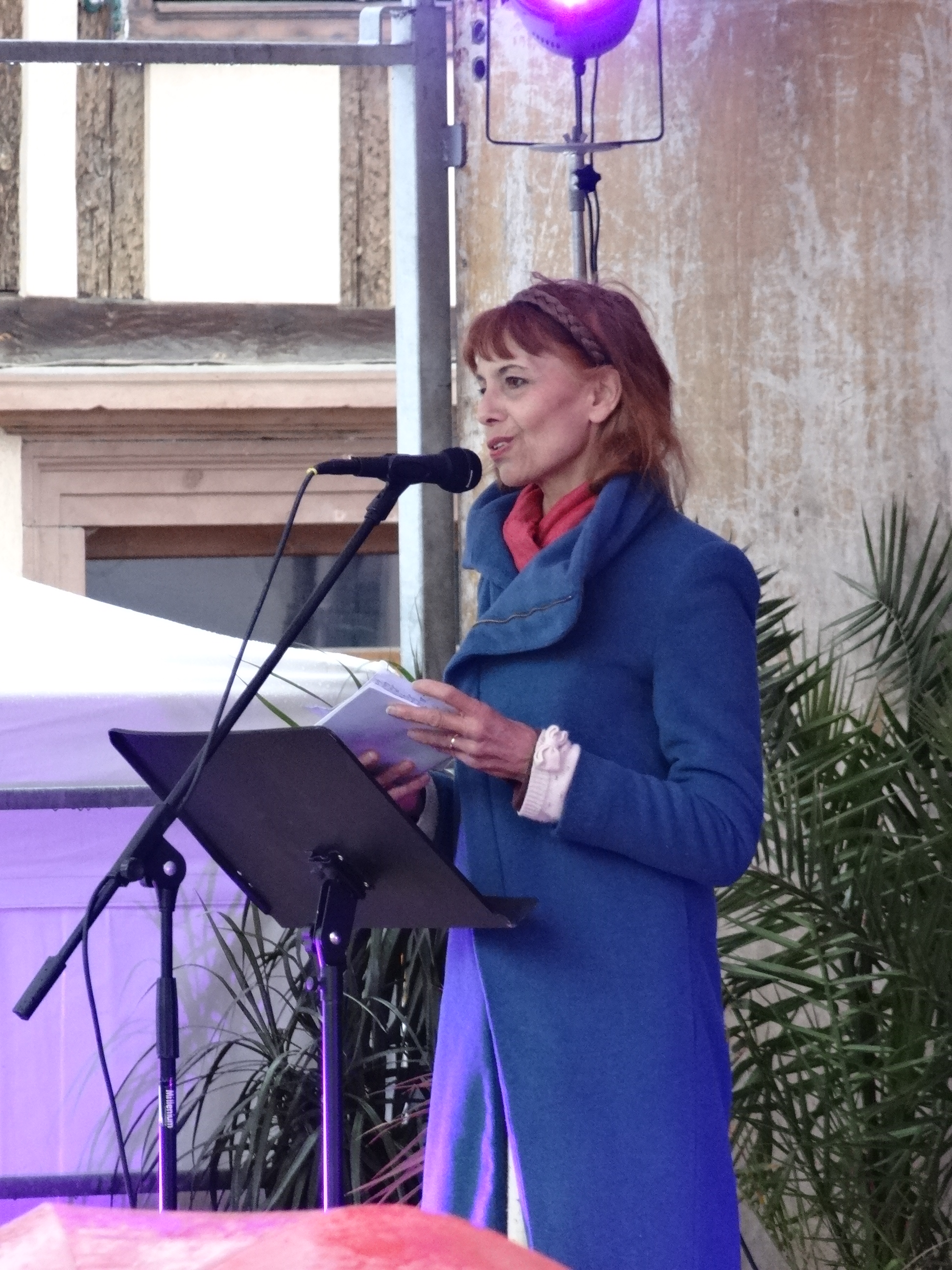 Sylvie Reff, le 29 mars 2015, à l'inauguration du sentier des poètes de Bischwiller.